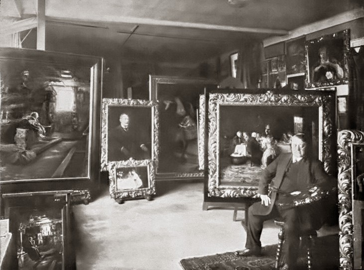 Malíř Jan rytiř Skramlík v ateliéru